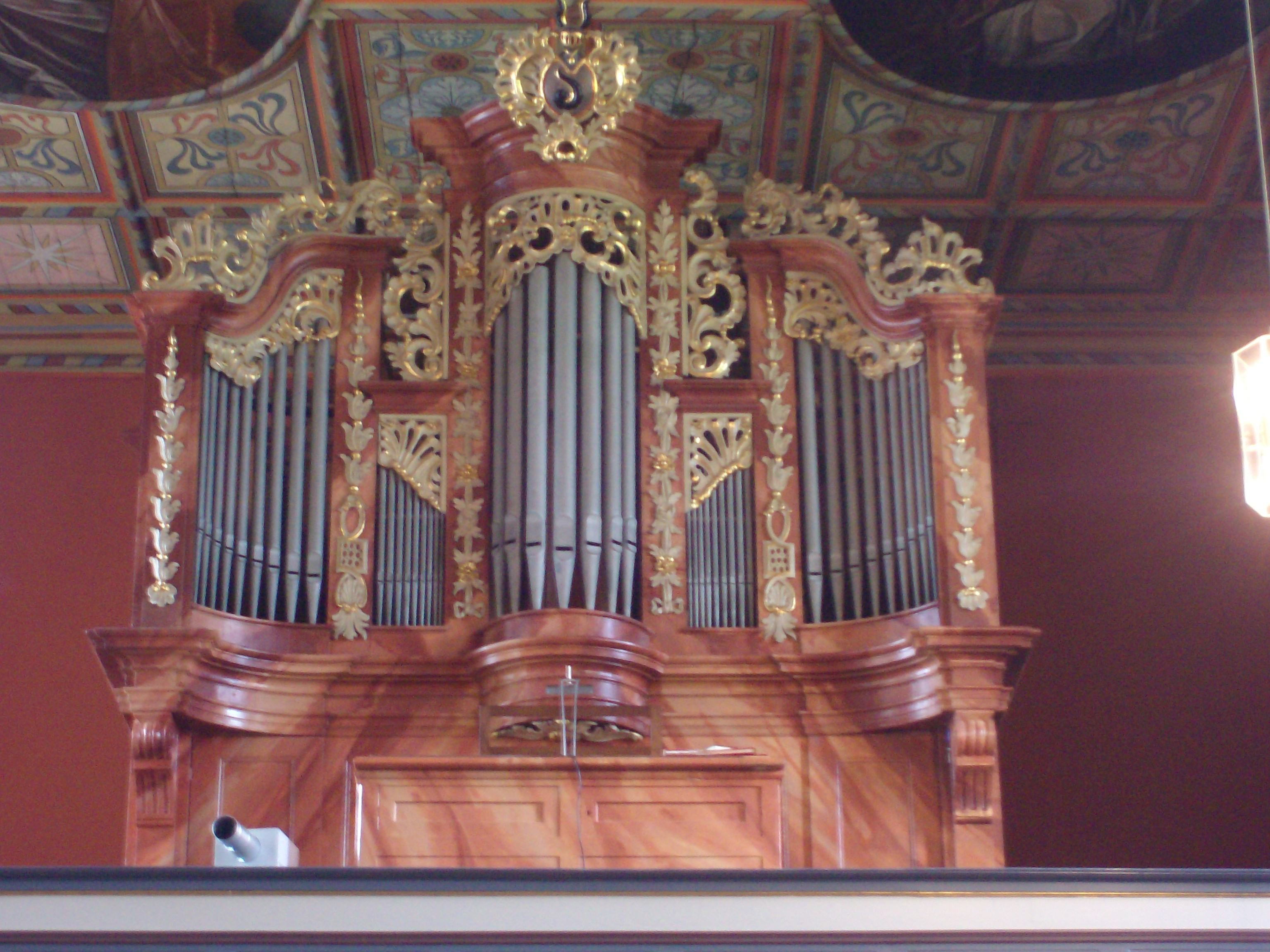 Orgel in St. Peter, Petersberg bei Fulda, Hessen